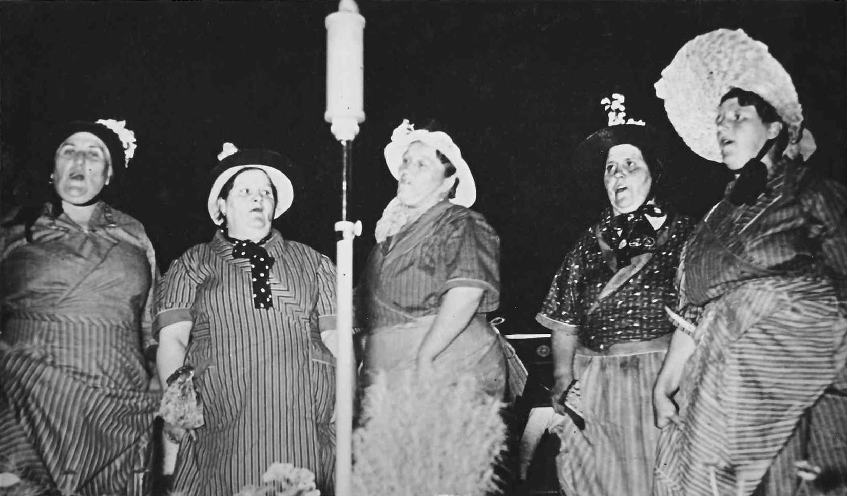 Fischerfrauen beim Vortrag am Reichssender Königsberg